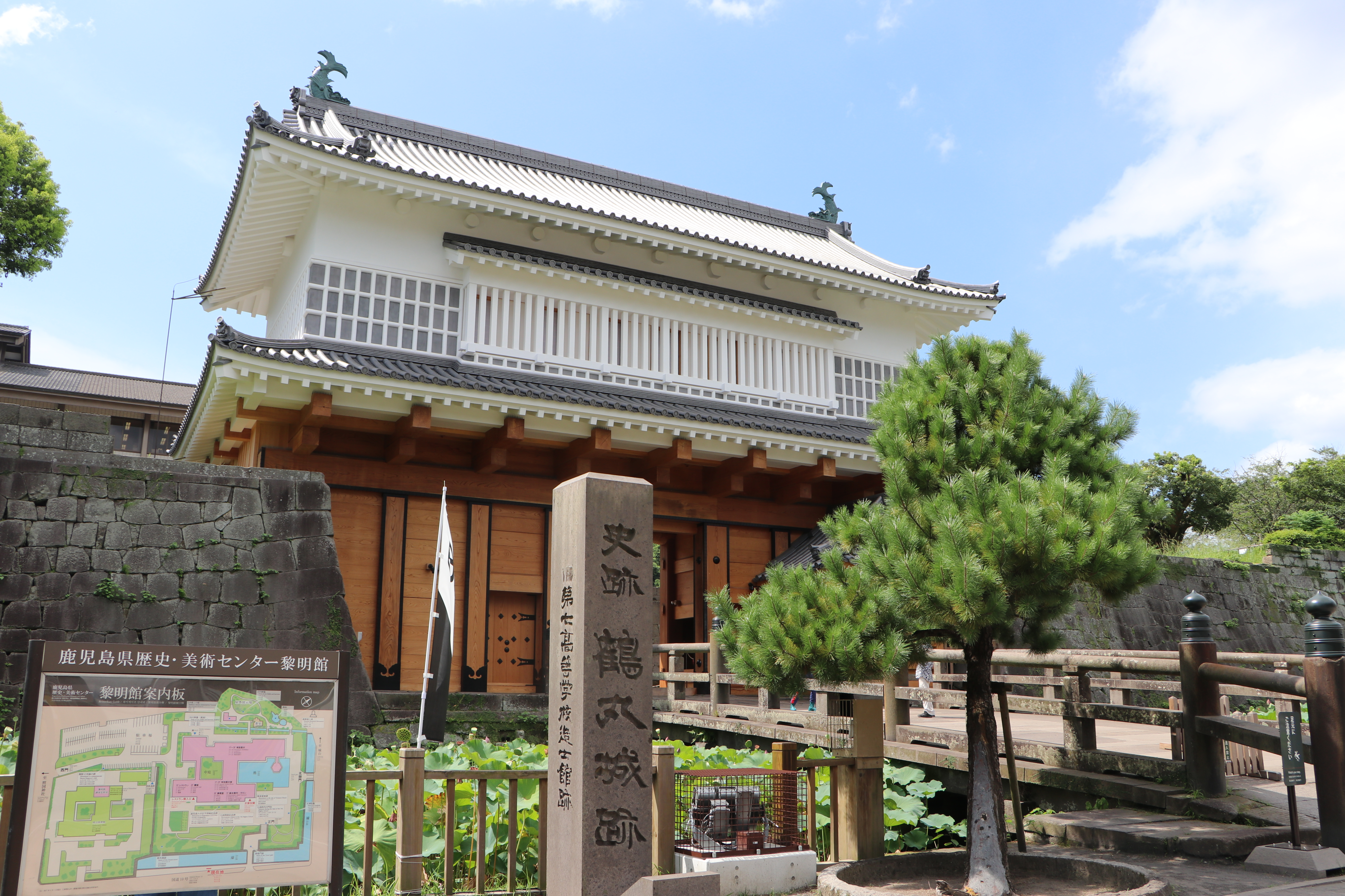 鹿児島城（別名：鶴丸城）の御楼門